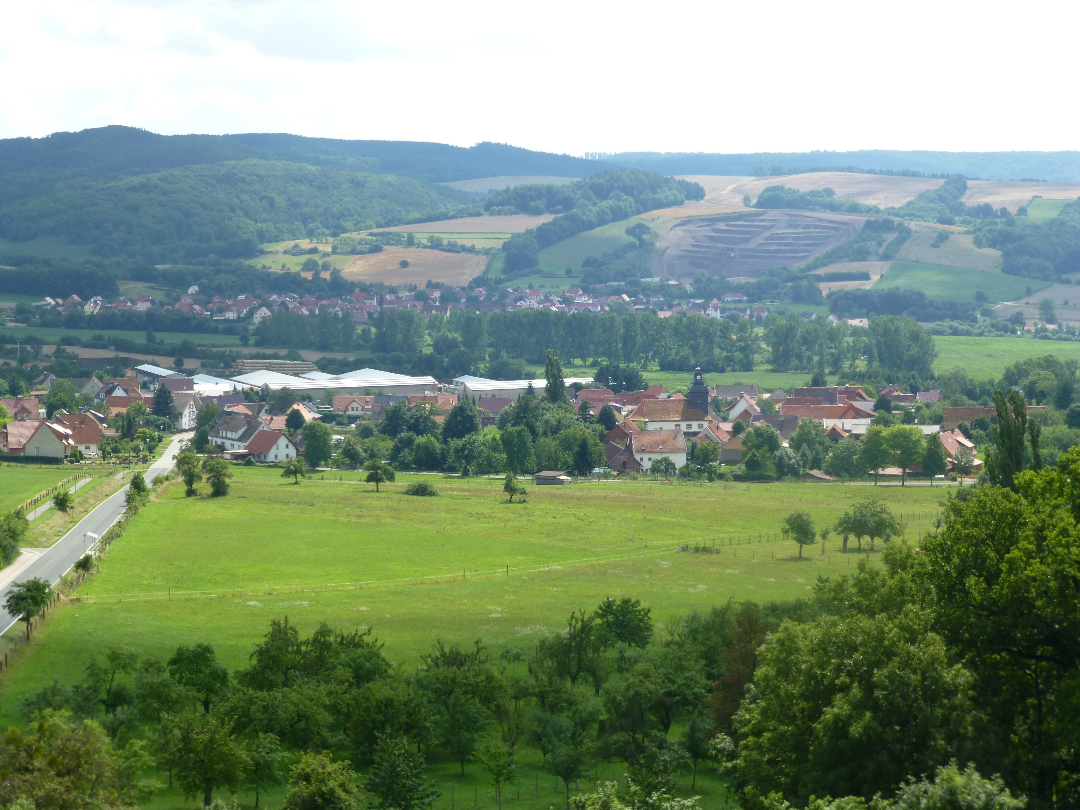 Blick von der Wehnder Warte auf Tastungen und dahinter Ferna (im Hintergrund links die Zinkspitze)